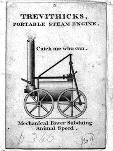 Catch me who can, eine 1808 von Richard Trevithick gebaute Dampflokomotive, abgebildet auf einer Eintrittskarte.